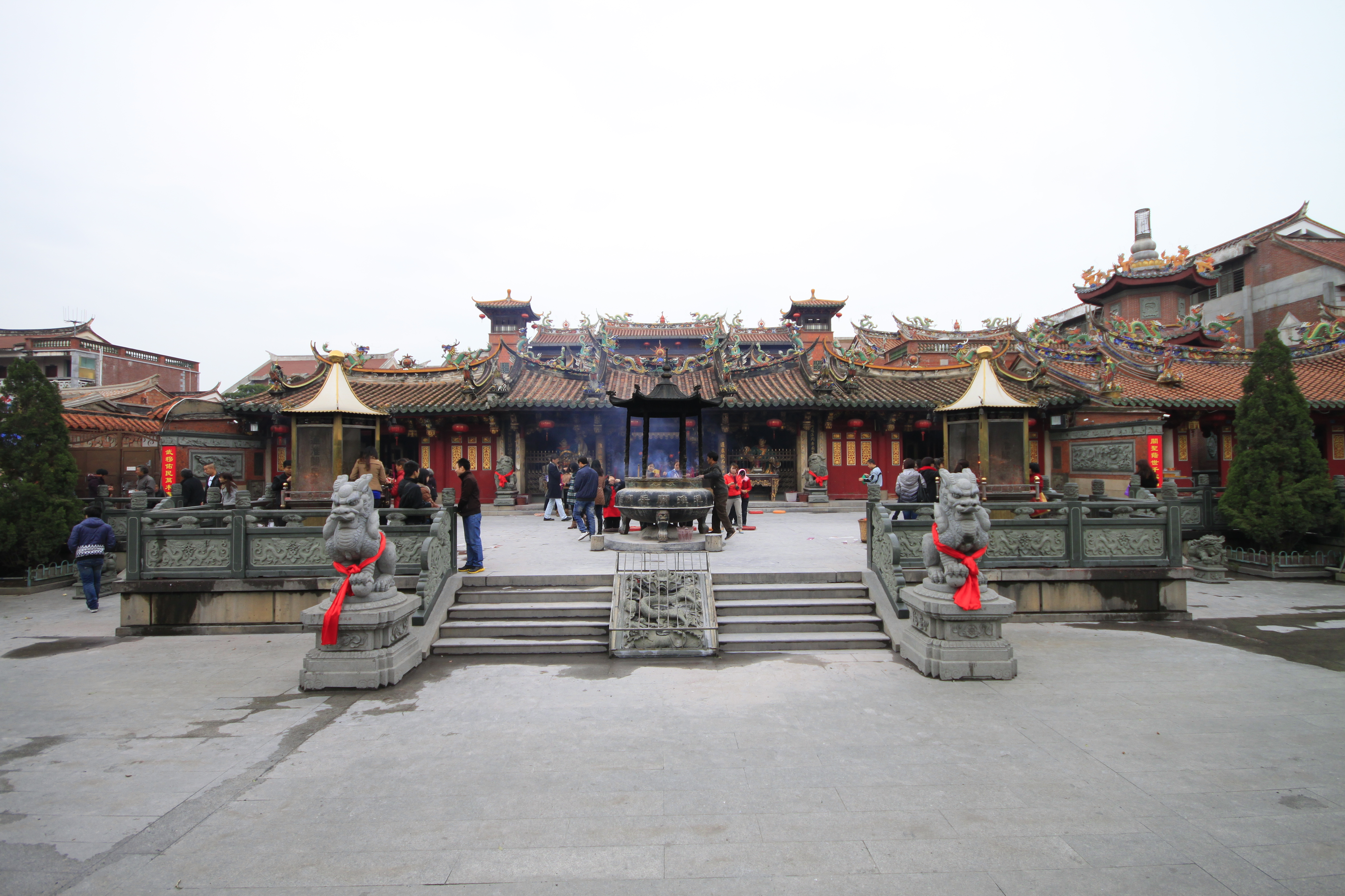 通淮关岳庙，位于中国福建省泉州市，是福建省文物保护单位。